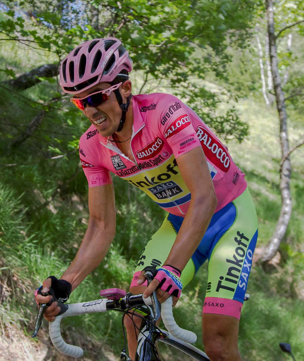 267 contador